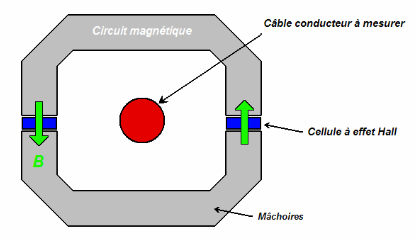 Schéma interne de la pince à effet Hall